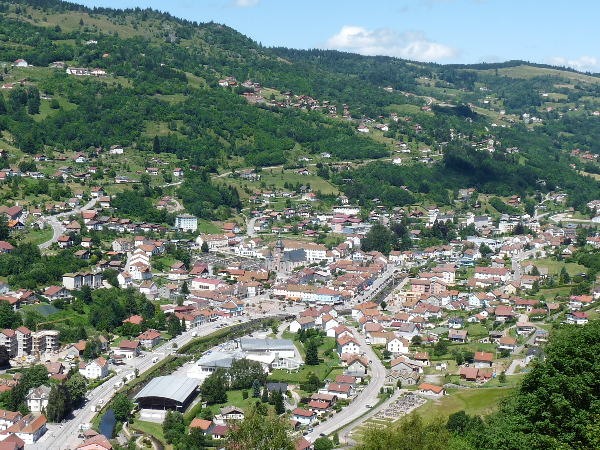 Vue de la Roche du Daval en 2012